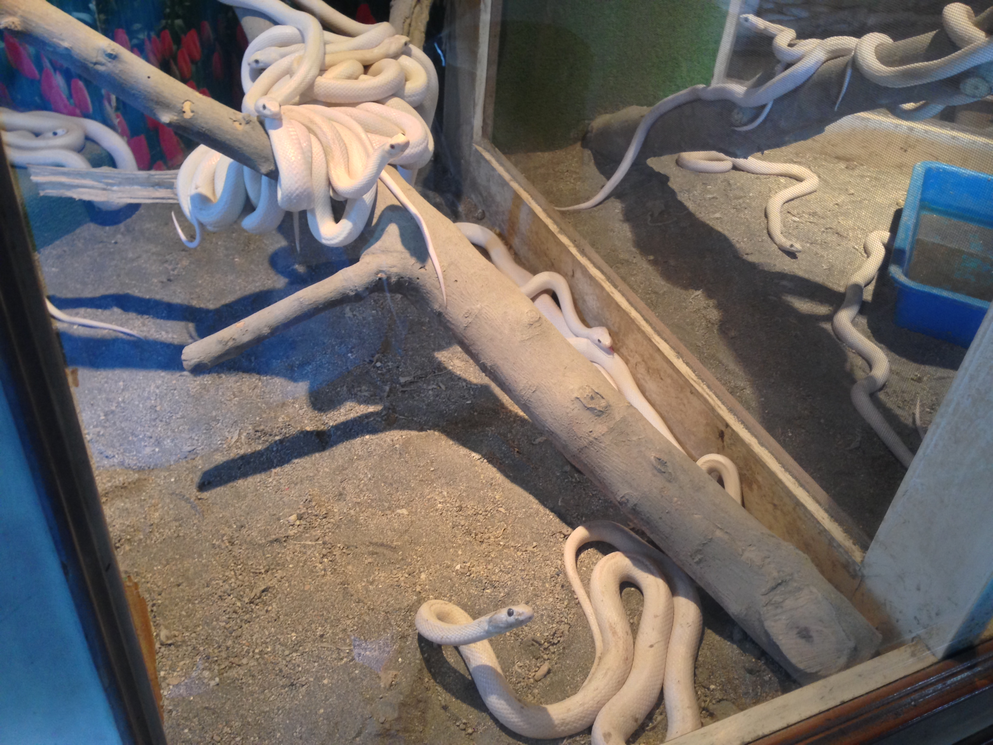 中文（台灣）: 白蛇廟白蛇